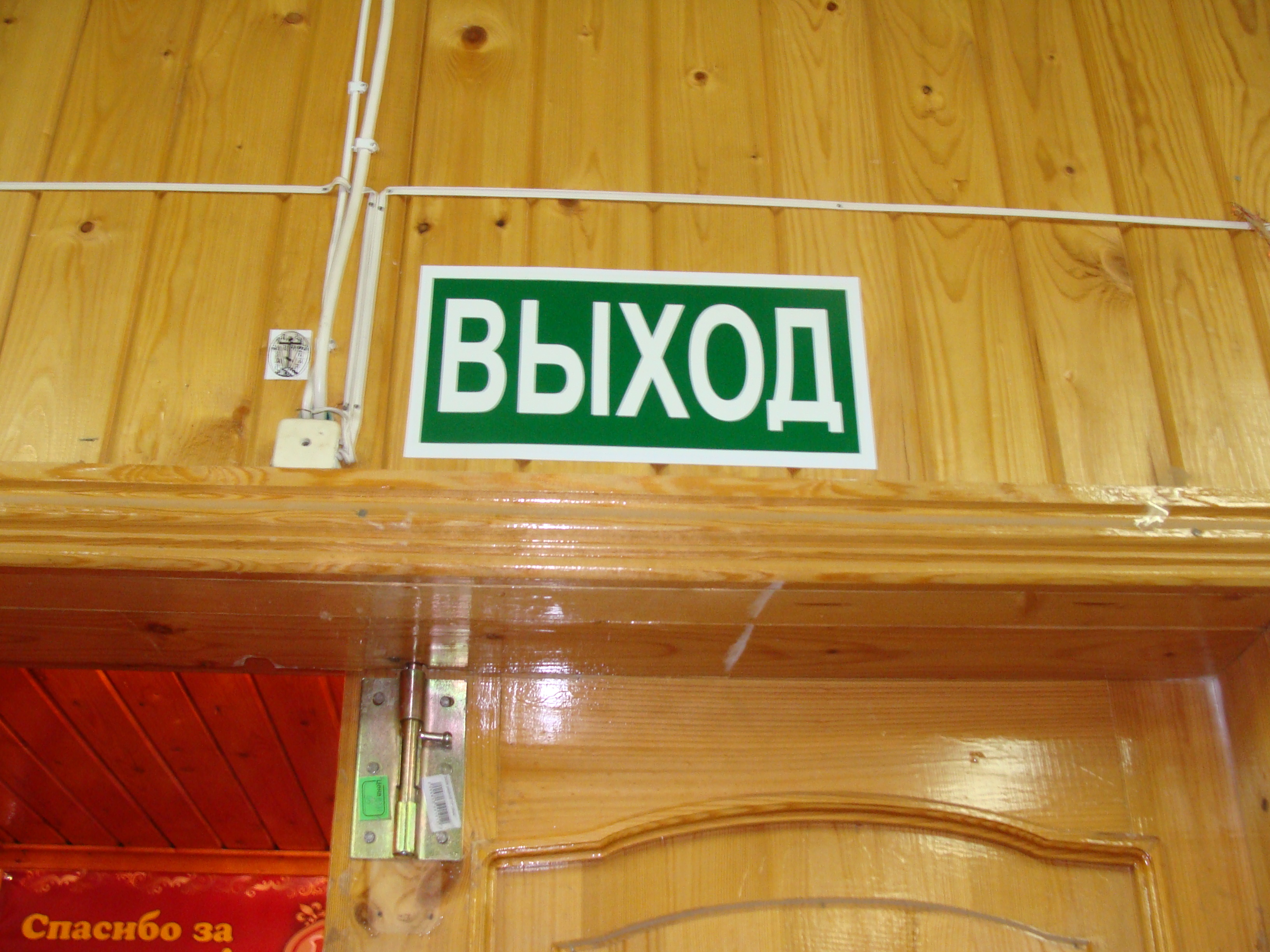 Эвакуационный знак пожарной безопасности "Выход"